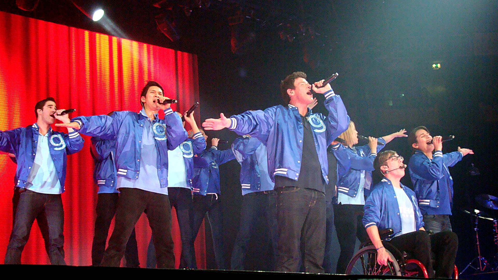 Somebody To Love